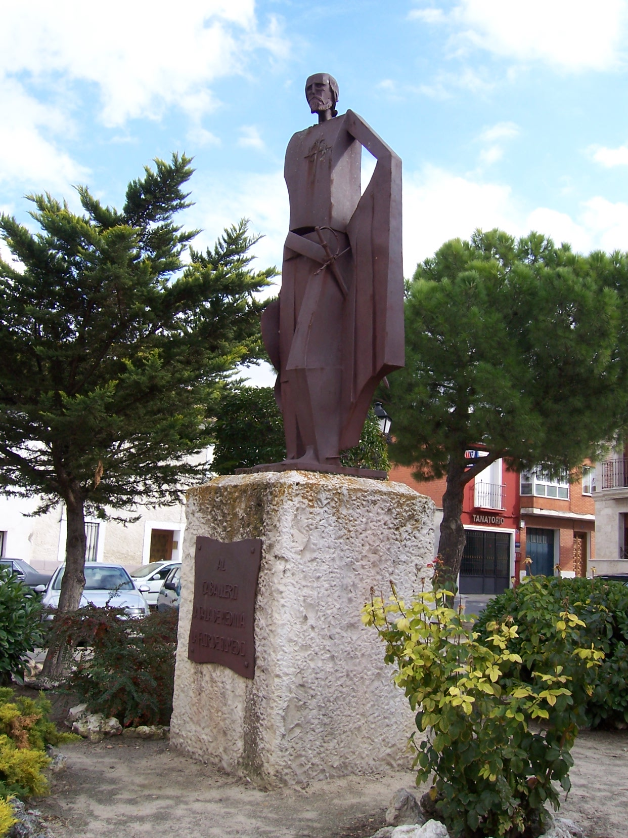 Olmedo: Estatua del personaje de ficción llamado Caballero de Olmedo, principal protagonista de la comedia de Lope de Vega El caballero de Olmedo. Se encuentra en ésta misma ciudad.